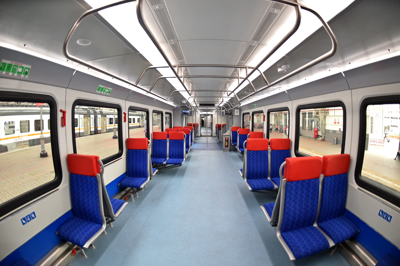 Интерьер моторного вагона электропоезда ЭГ2Тв